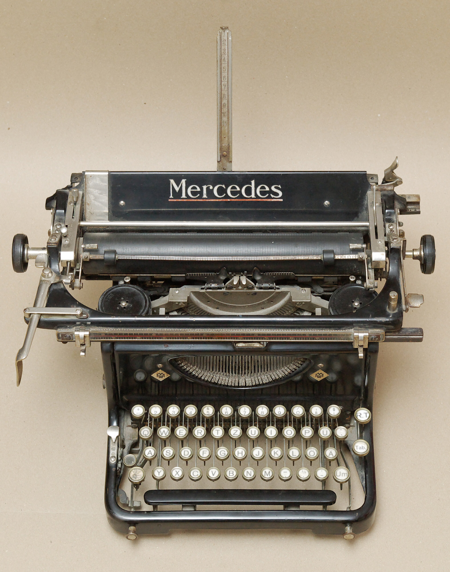 Schreibmaschine Mercedes, ca. 1905